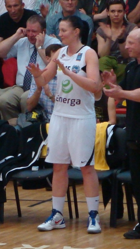 Brytyjska koszykarka Julie Page w barwach Katarzynek Energi Toruń